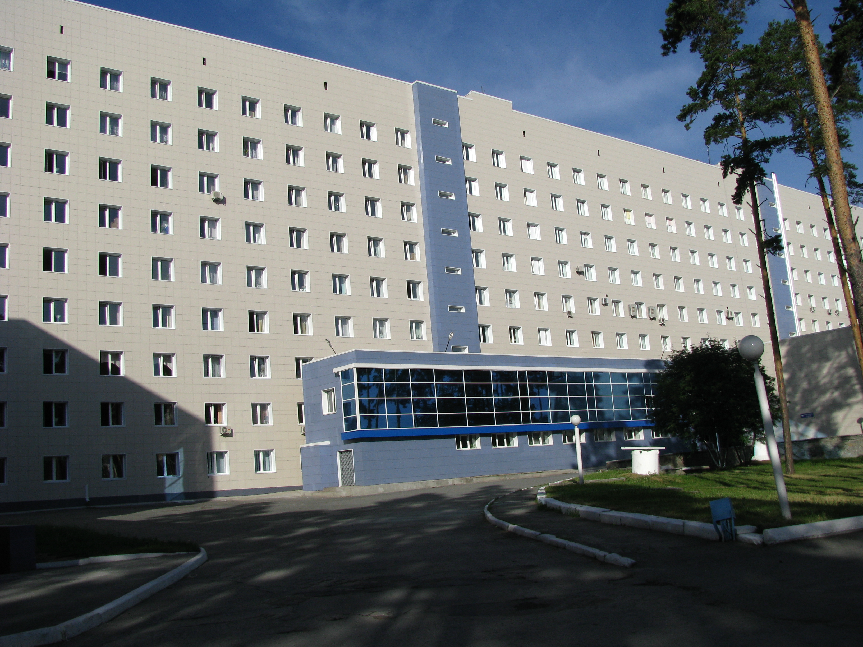 Областная клиническая больница №1 Свердловской области (СОКБ №1), Екатеринбург, ул. Волгоградская, 187 (находится на территории Екатеринбургского медгородка